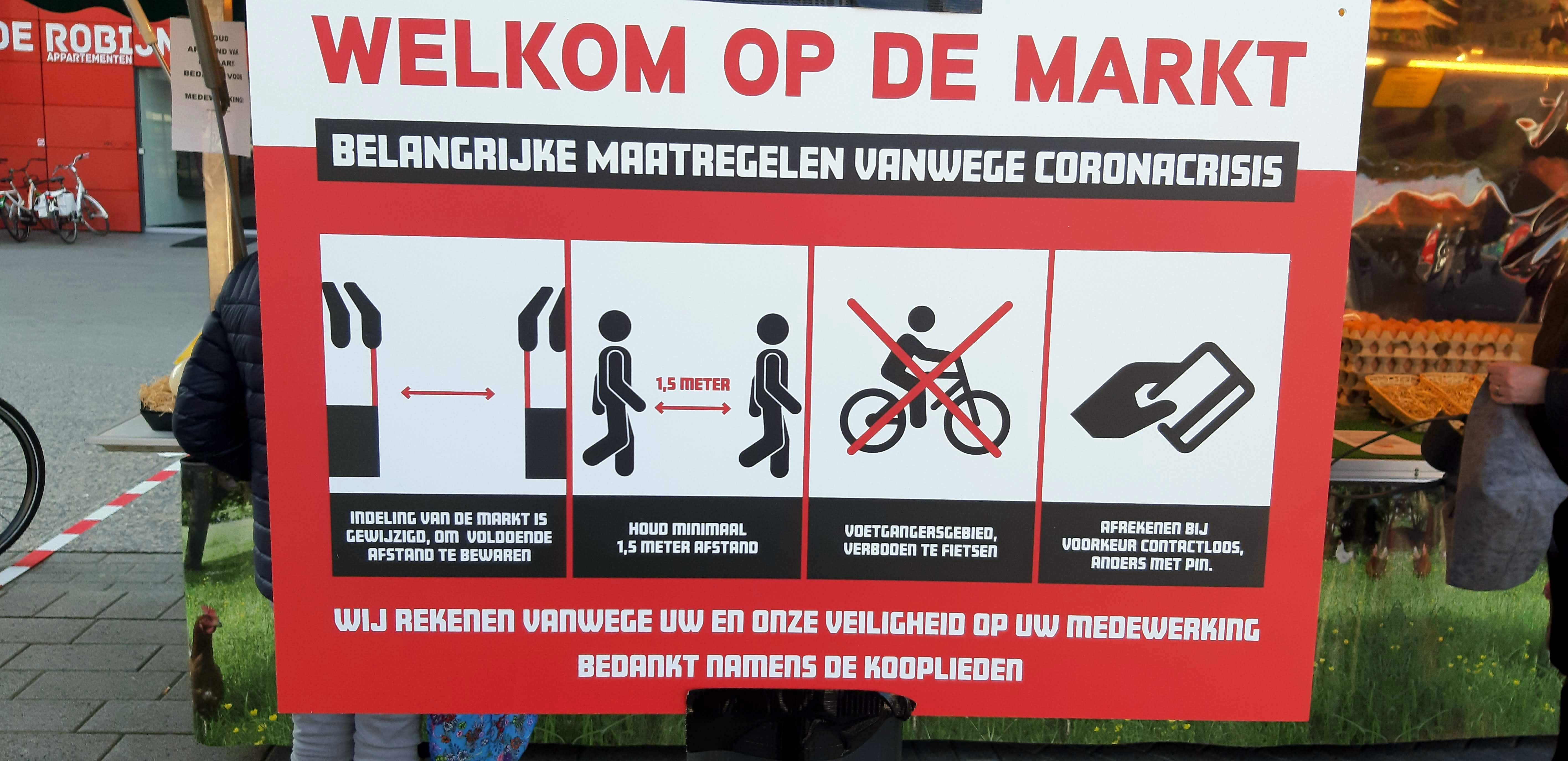 Welkom op de markt tijdens Covid-19 uitbraak